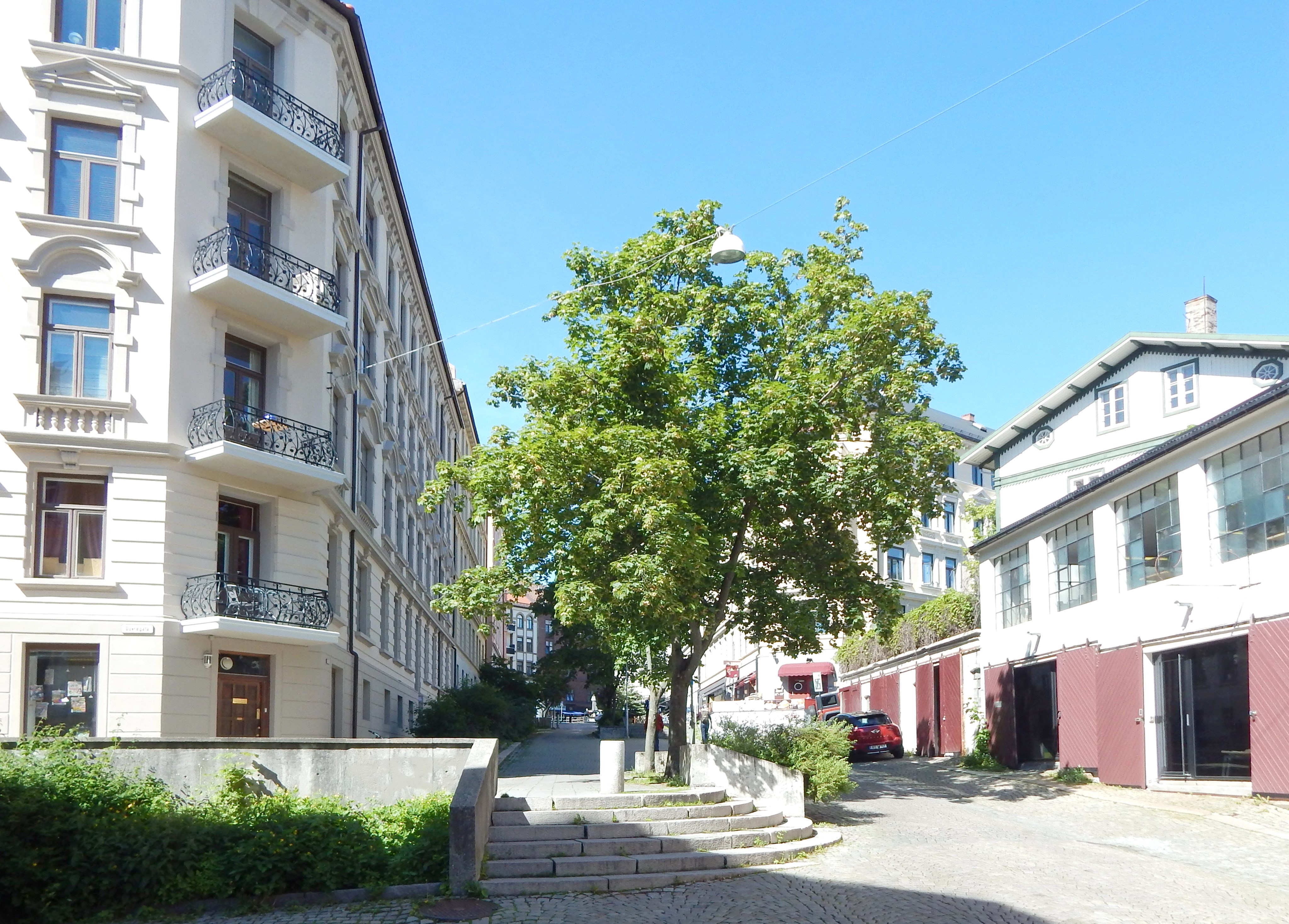 Hallings gate øst for Dovregata